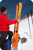 Splitboard Montage 2. Board teilen